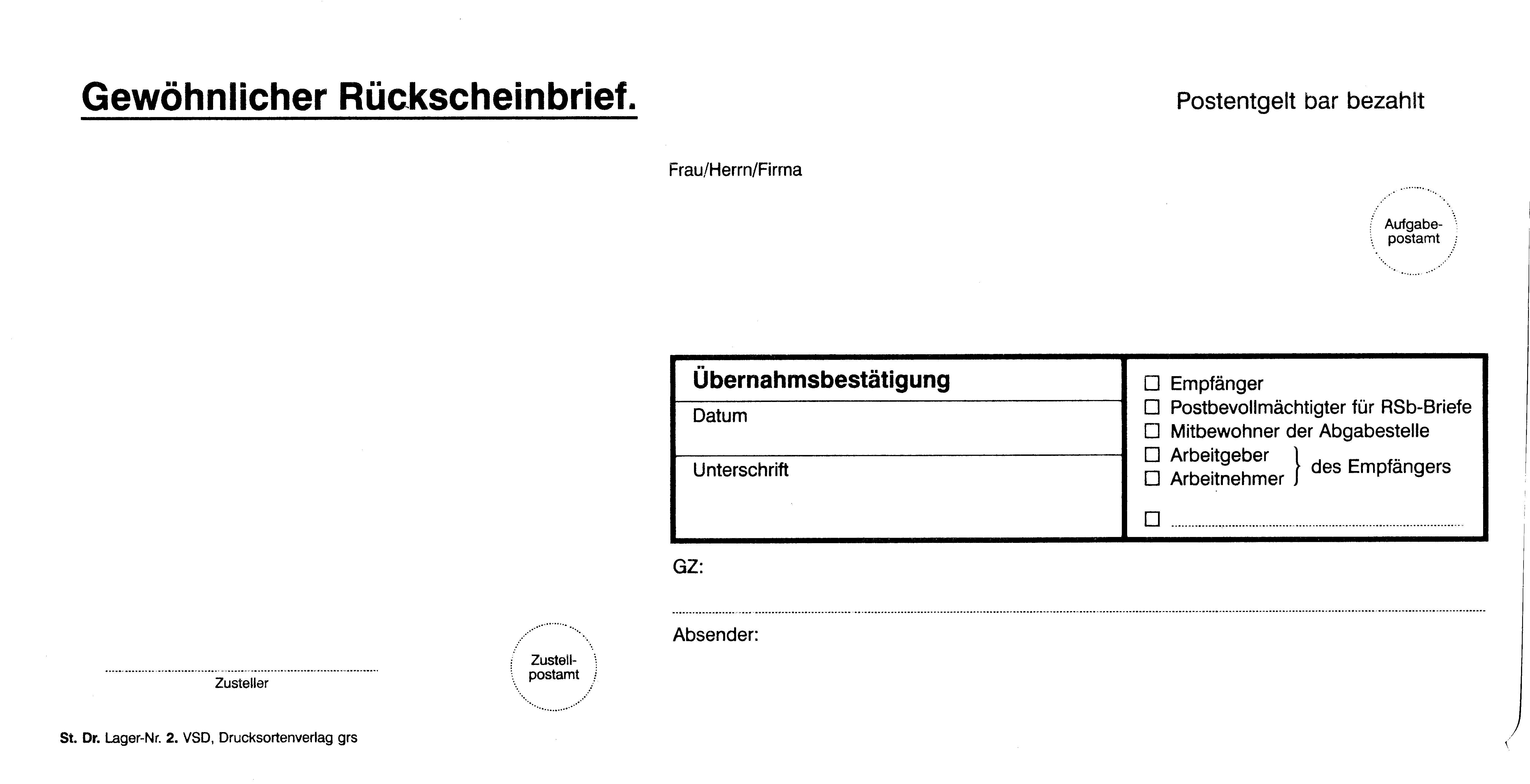 Ein Muster des erwerbbaren "Gewöhlichen Rückscheinbriefes"